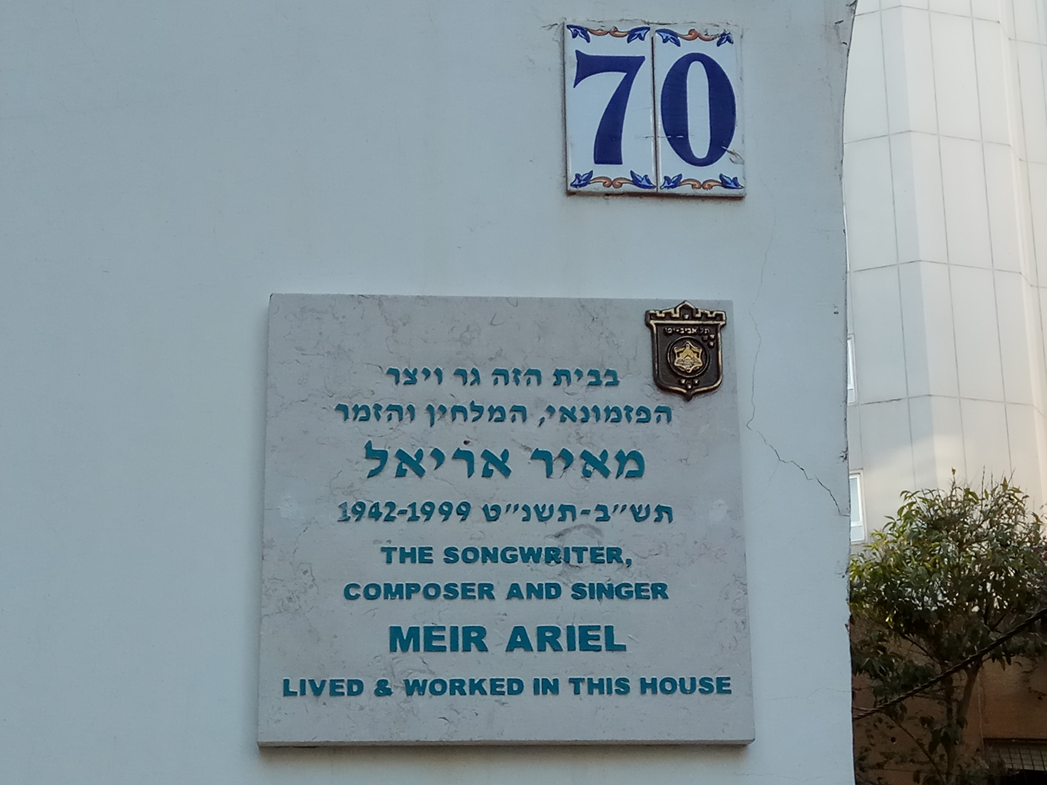 לוחית זיכרון למאיר אריאל על ביתו ברחוב הירקון 70 בתל אביב